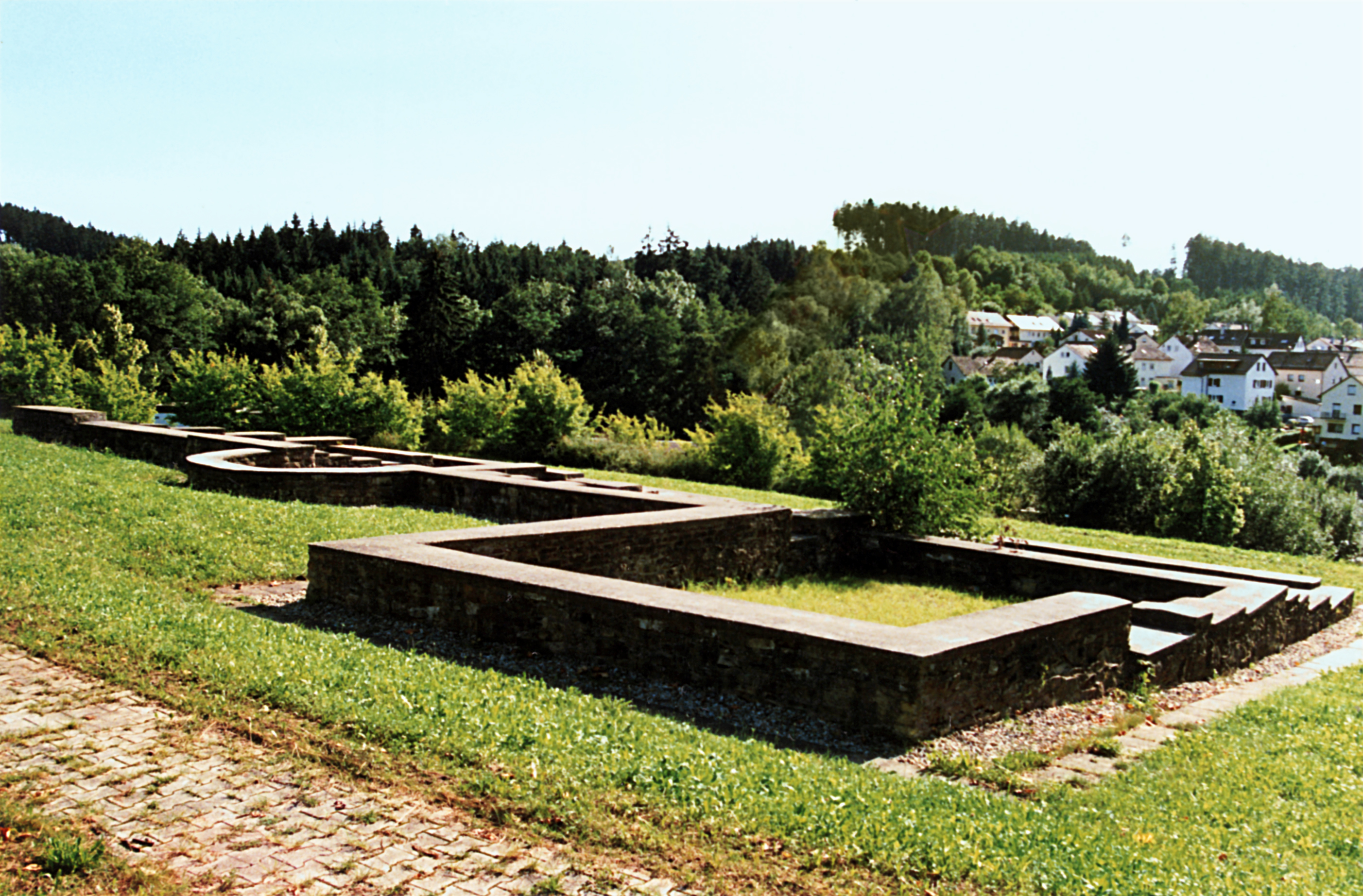 Die 1893 erstmals mit wissenschaftlichem Ansatz aufgegedeckte Therme des Limeskastells Schirenhof, Ostalbkreis, Baden-Württemberg.